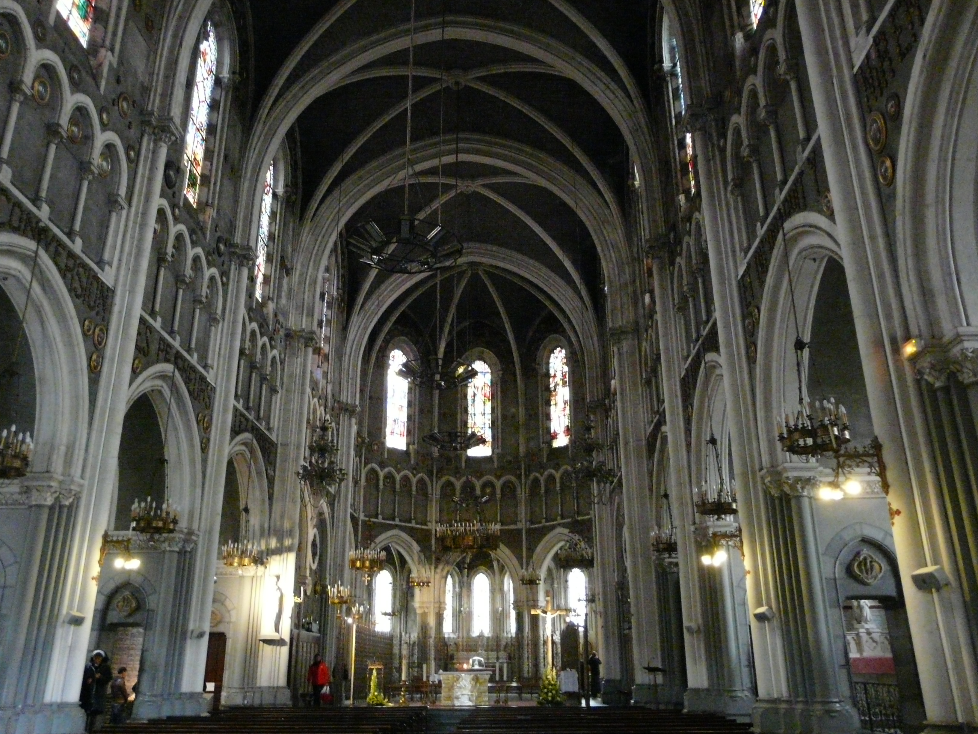 La nef de la basilique de l'Immaculée-Conception, Lourdes, Hautes-Pyrénées, France.